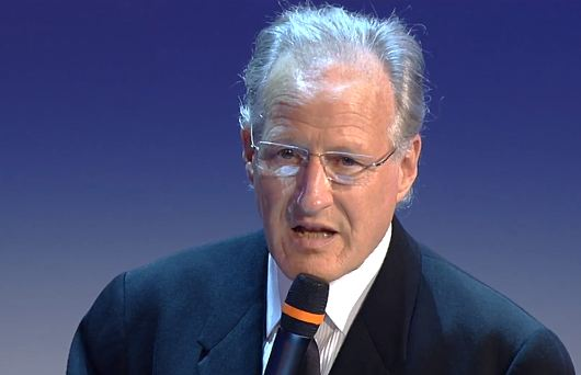 Майкл Манн на 69-м Венецианском кинофестивале.